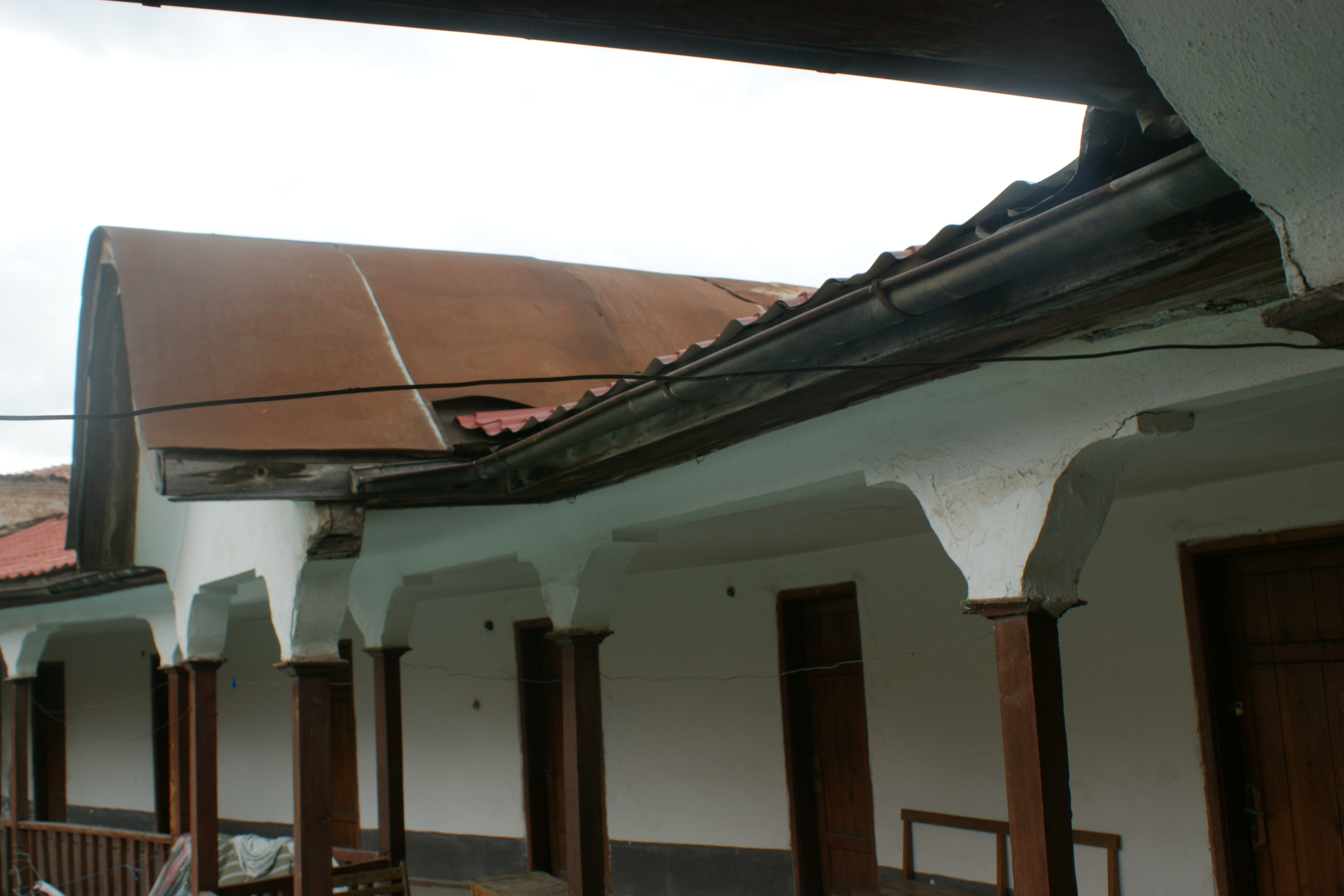 Hani "elbasani"